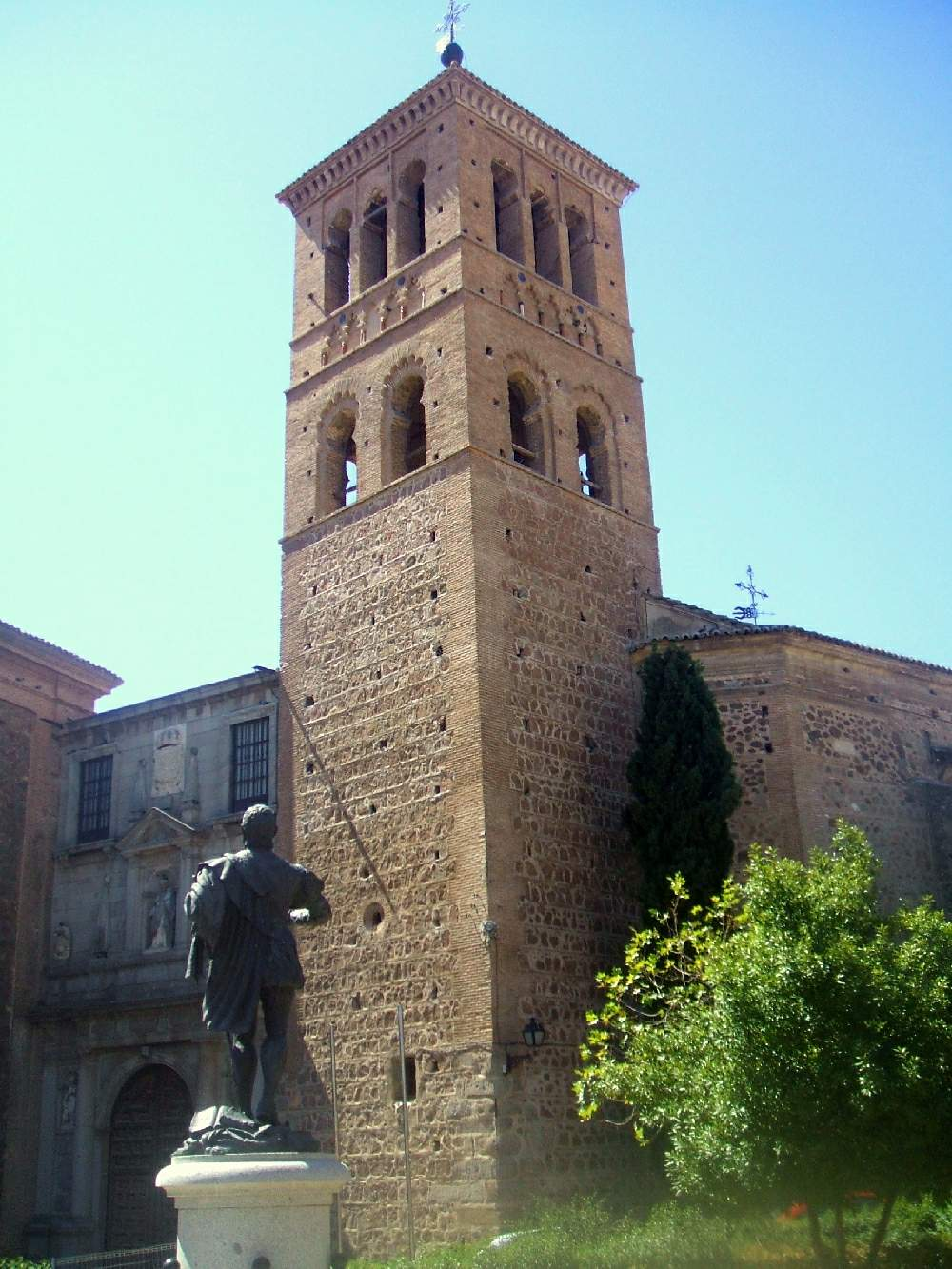 Iglesia de San Román, Museo de los Concilios y de la Cultura Visigoda, en Toledo